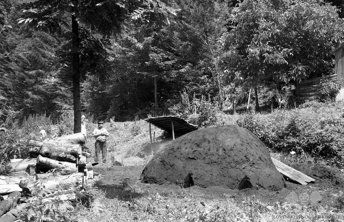 Boharina (Dravinjska dolina), goreča kopa.